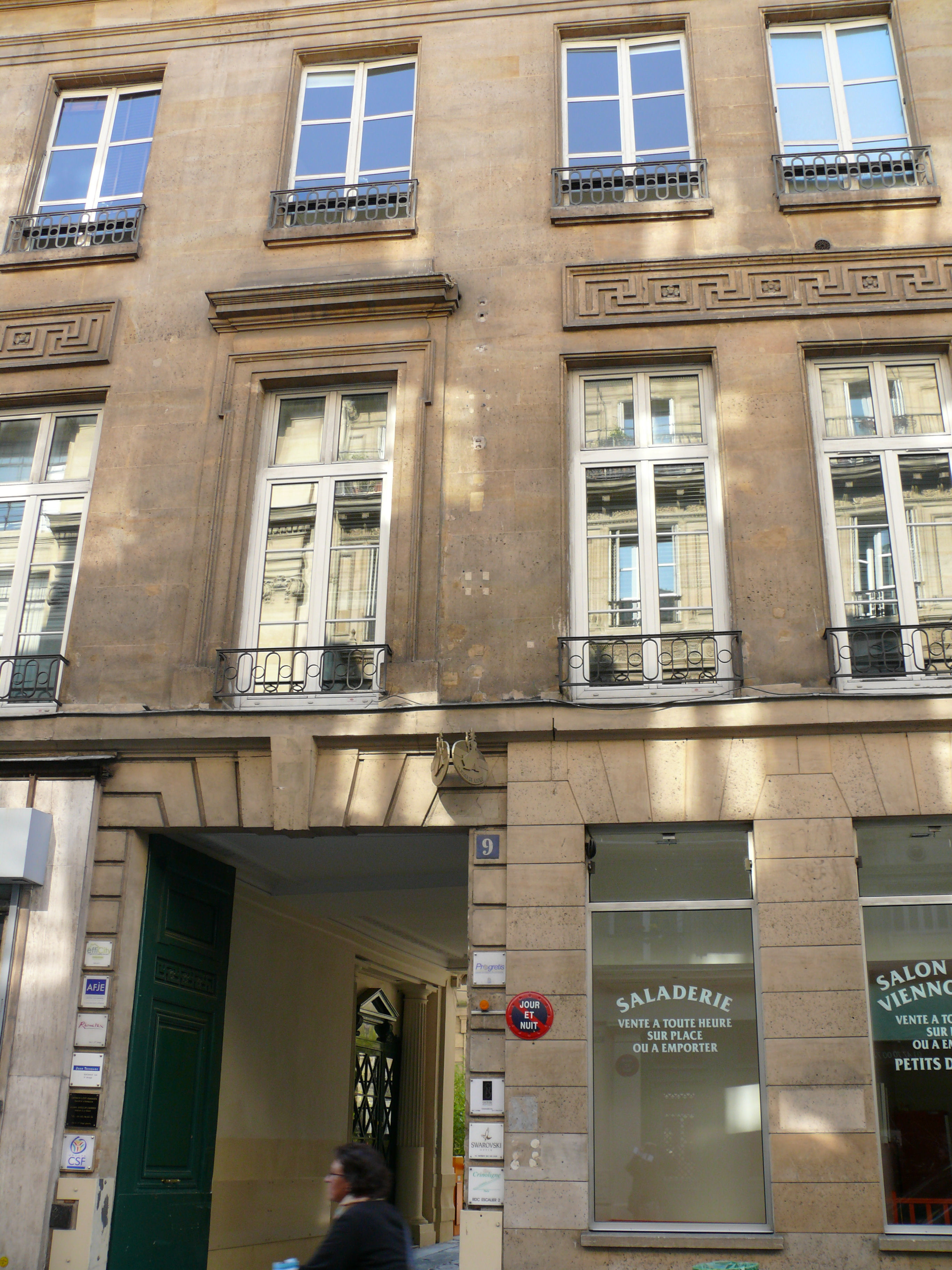 Paris 9ème arrondissement - Maison - Façade sur la rue du Faubourg-Poissonnière